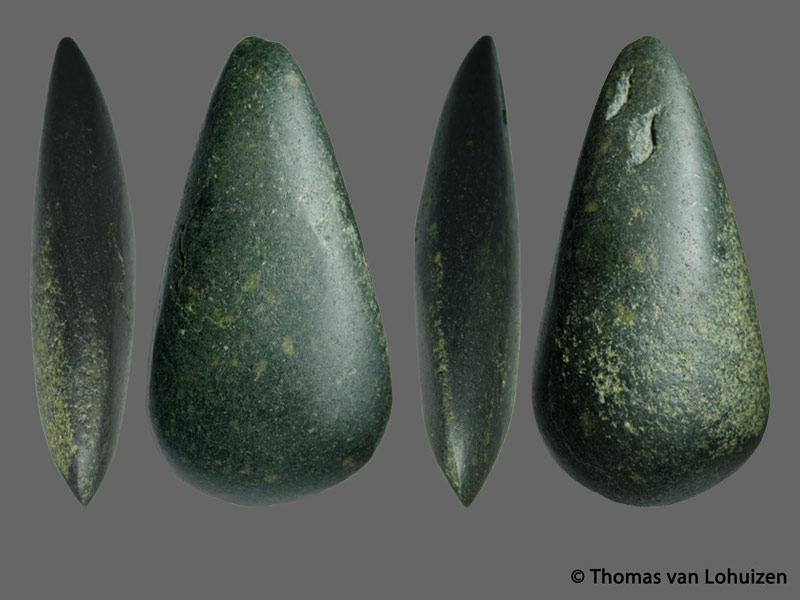 Beilklinge (Länge 8.4 cm) vom Typ "Durrington" aus dem Mineralgestein Eklogit vom Monte Viso (Italien) im Erdreich aufrecht stehend angetroffen während einer Baumaßnahme in der Flur "Im Soestfeld" in Ratingen-Lintorf